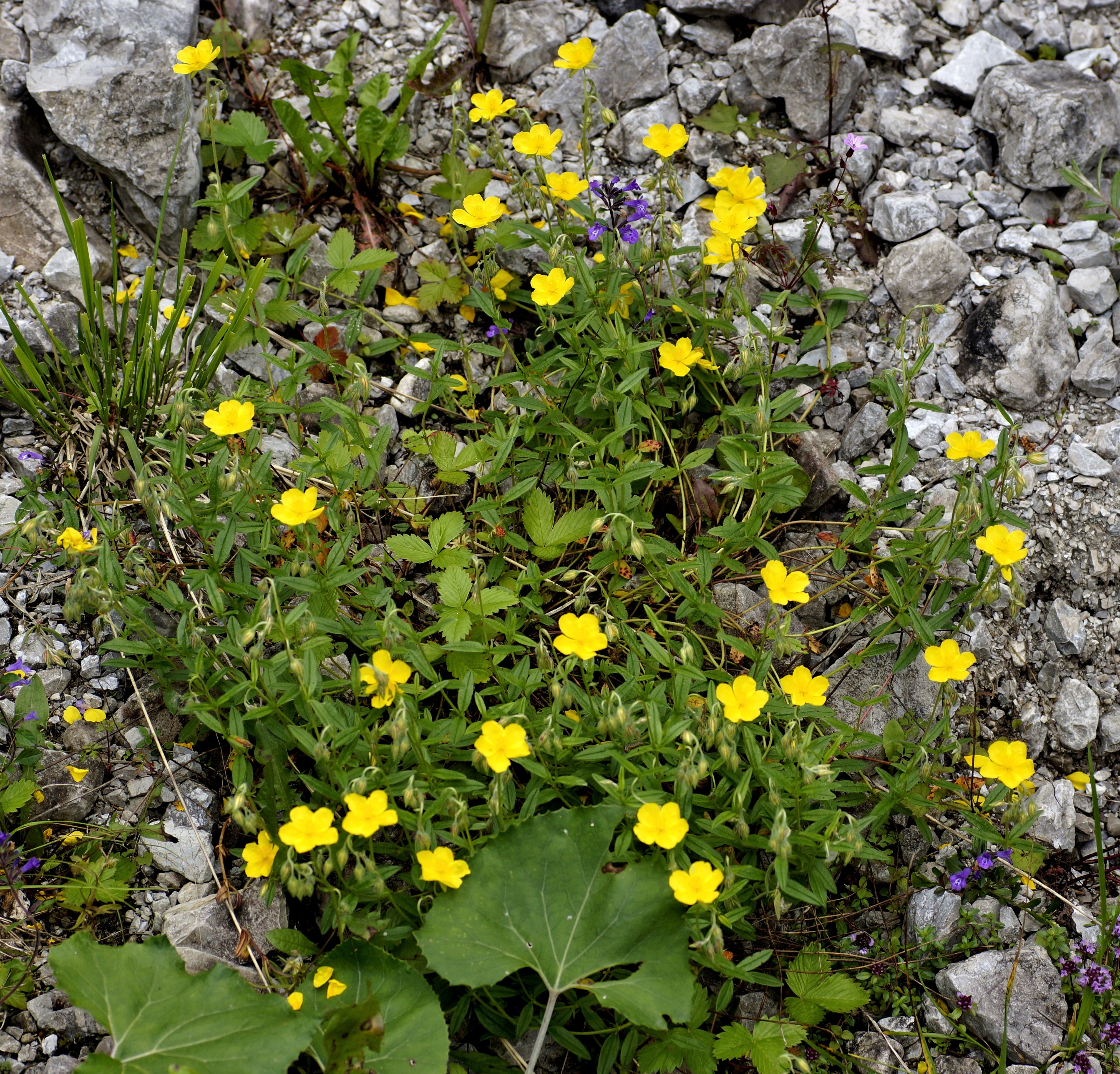 Gewöhnliches Sonnenröschen, Cistaceae Deutschland, Oberstdorf, Oy-Tal, 1000 m Photo: U.Schmidt, 8.VII.2013